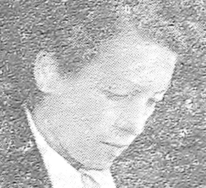 Teresa Andrés Zamora (1907-1946) Bibliotecaria que llevó a cabo las bibliotecas de Cultura Popular, organismo cercano al PCE que se creó en 1936